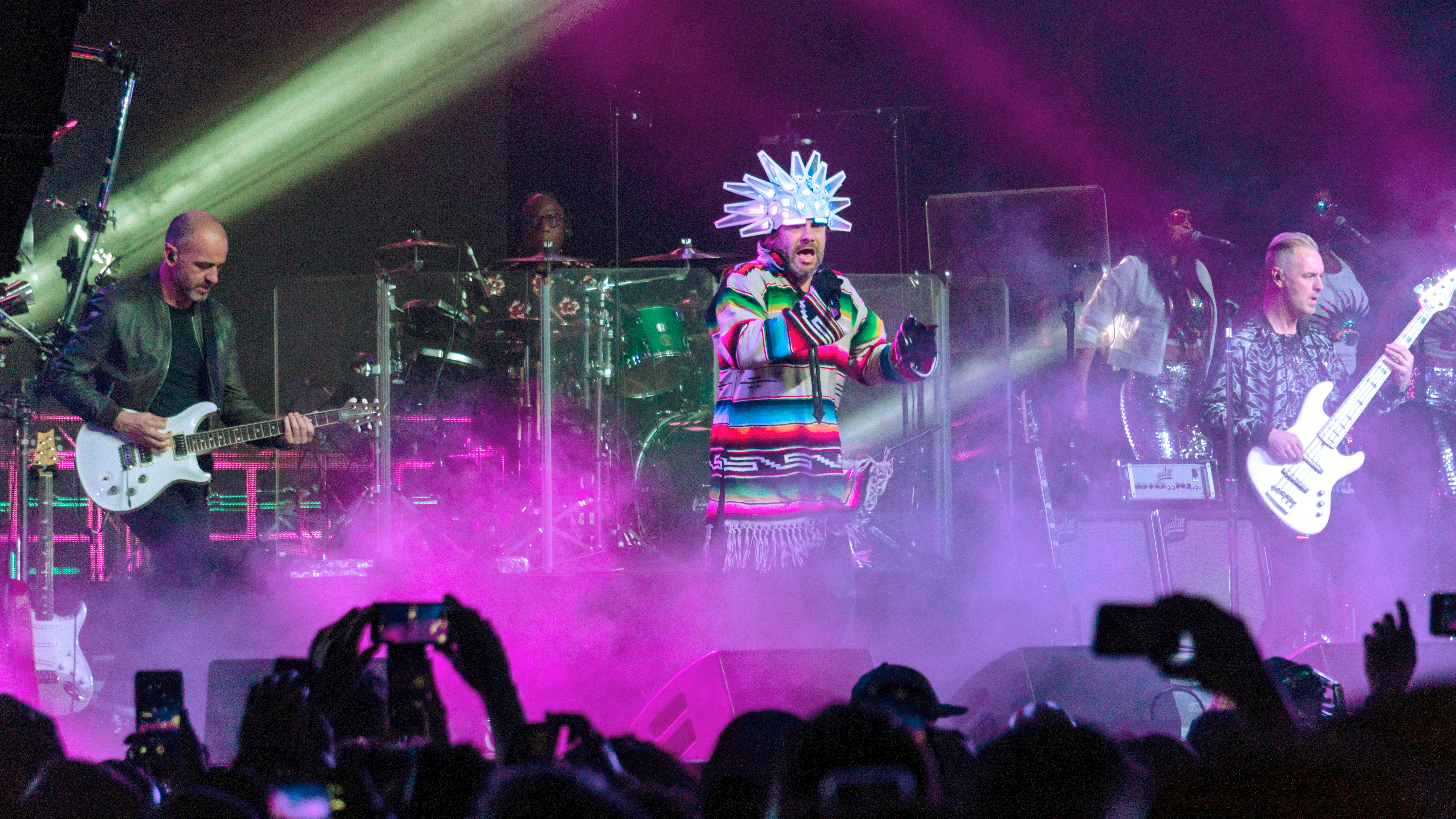 Coachella18W1-121